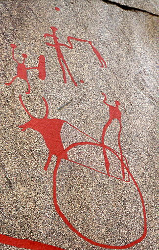 Gravure préhistorique de Tanum, Suède